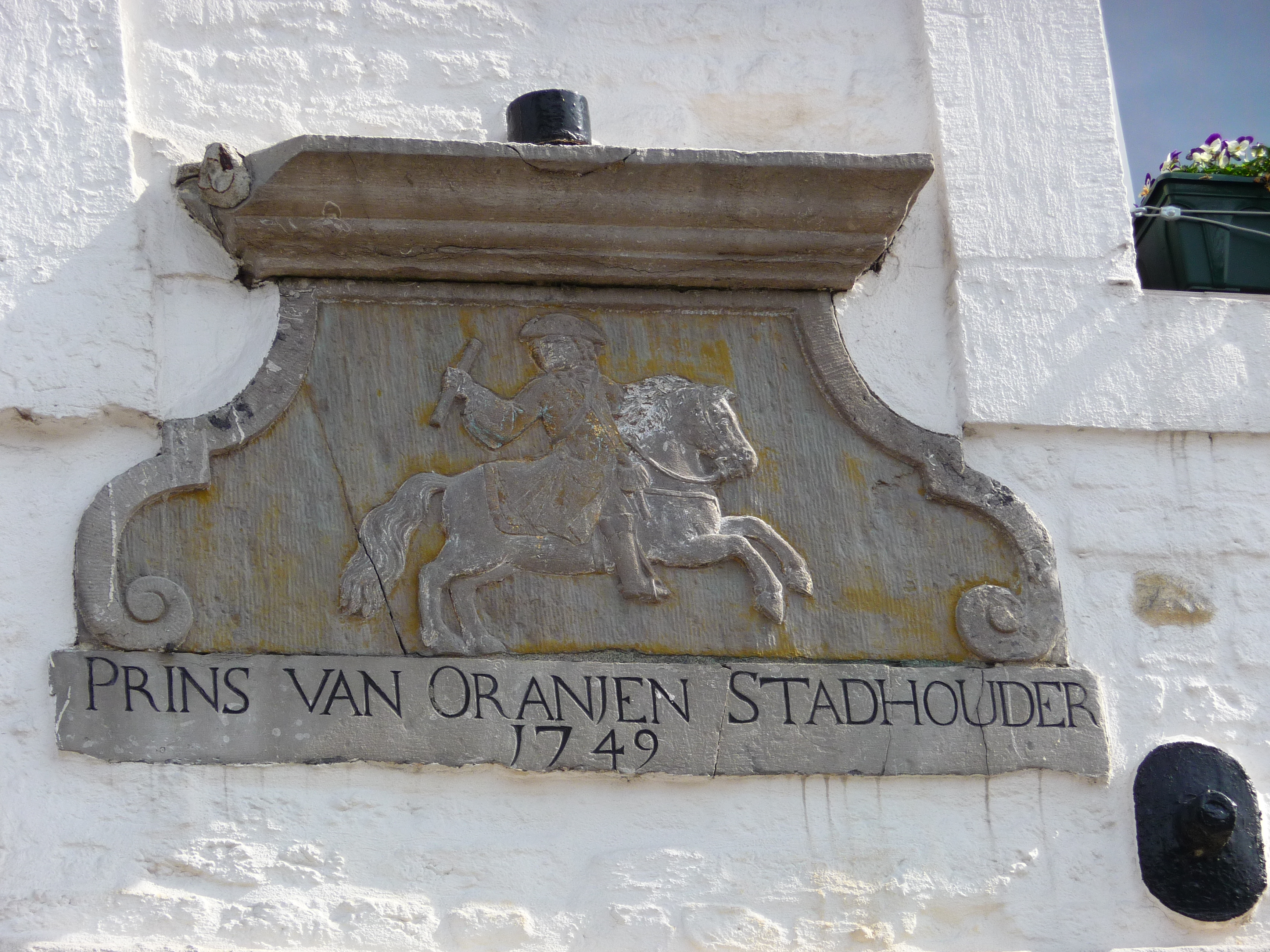 Rijksmonument in Maastricht.